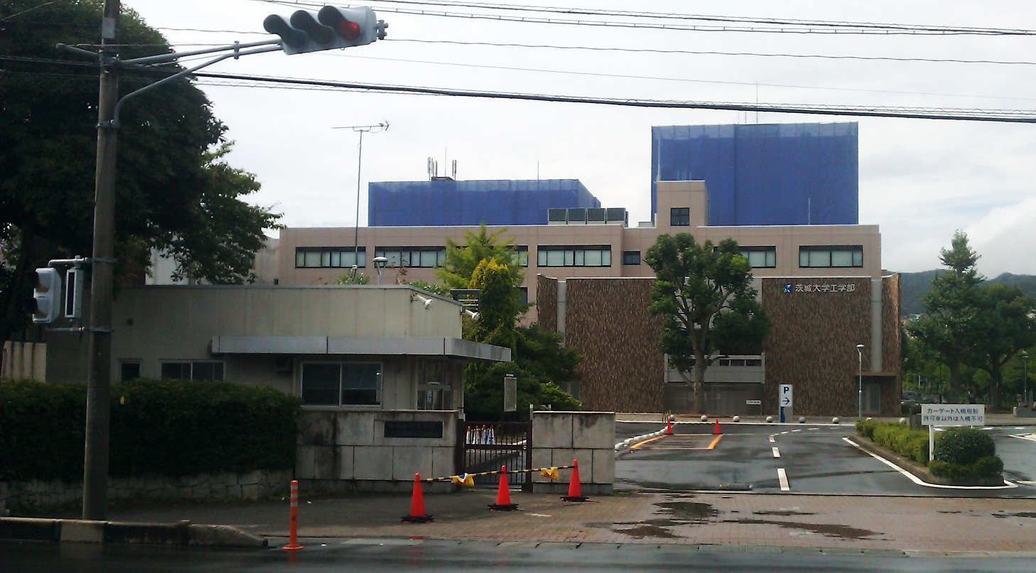 茨城大学日立キャンパス正門の画像